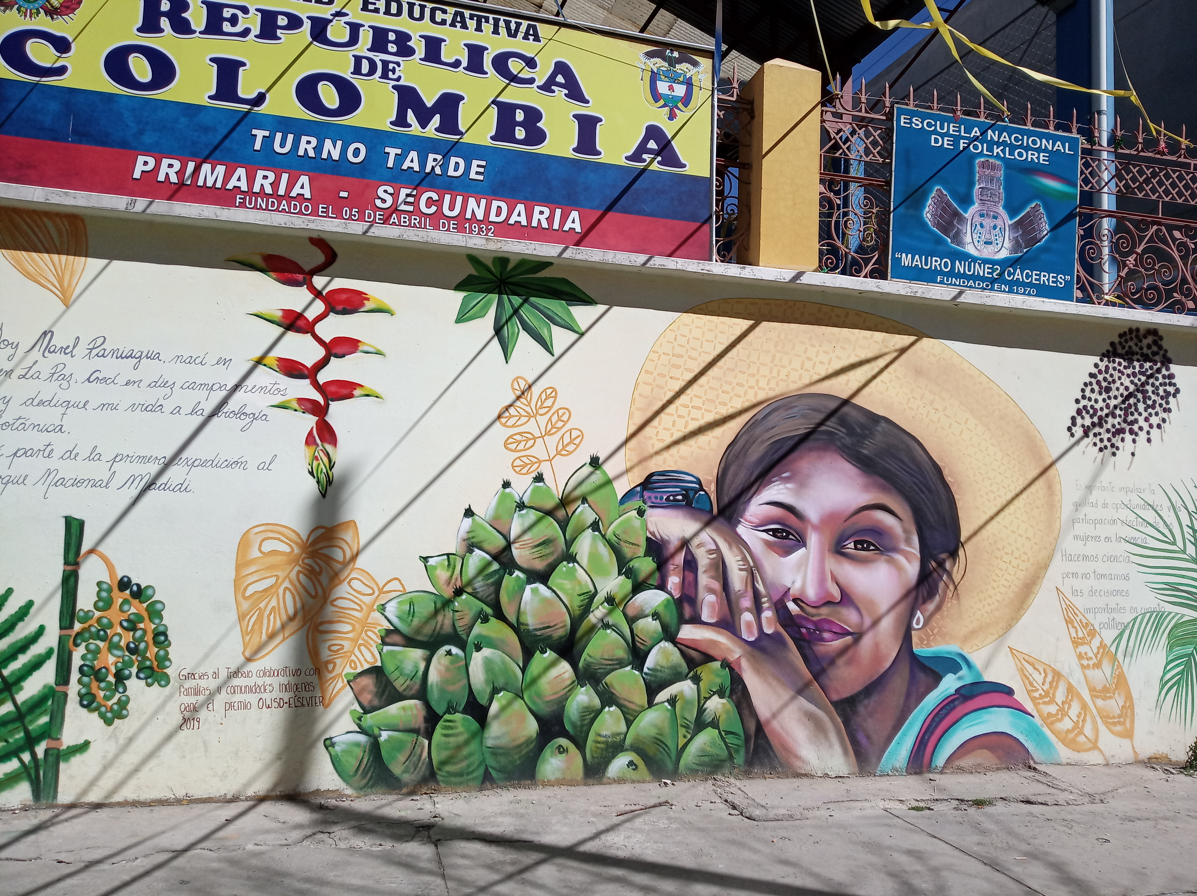 Mural urbano inspirado en el trabajo de investigación etnobotánica de la bióloga Narel Paniagua realizado por la artista Norka Paz en el barrio de Sopocachi en La Paz.